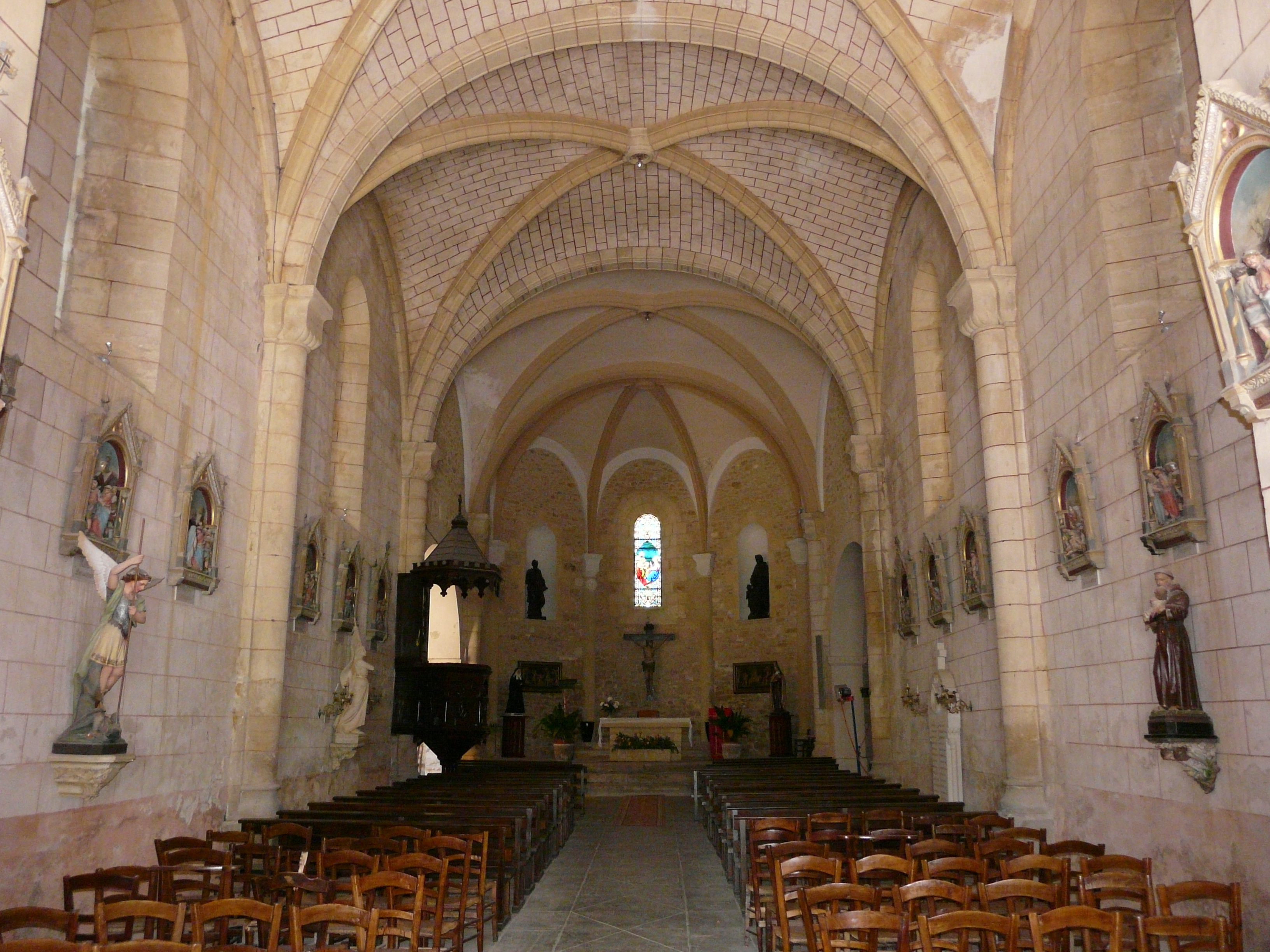 La nef de l'église Saint-Martial, Saint-Martial-de-Nabirat, Dordogne, France.